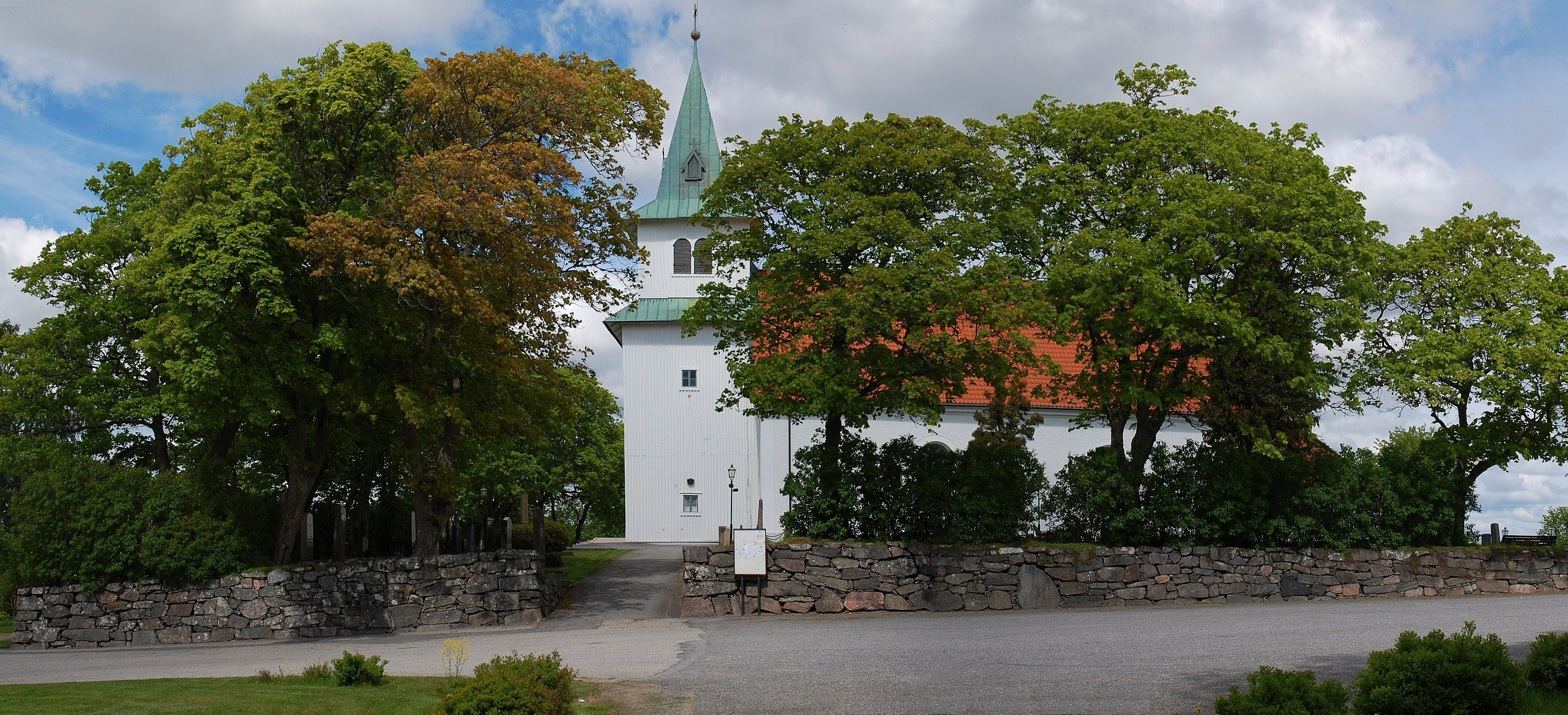 Foss kyrka